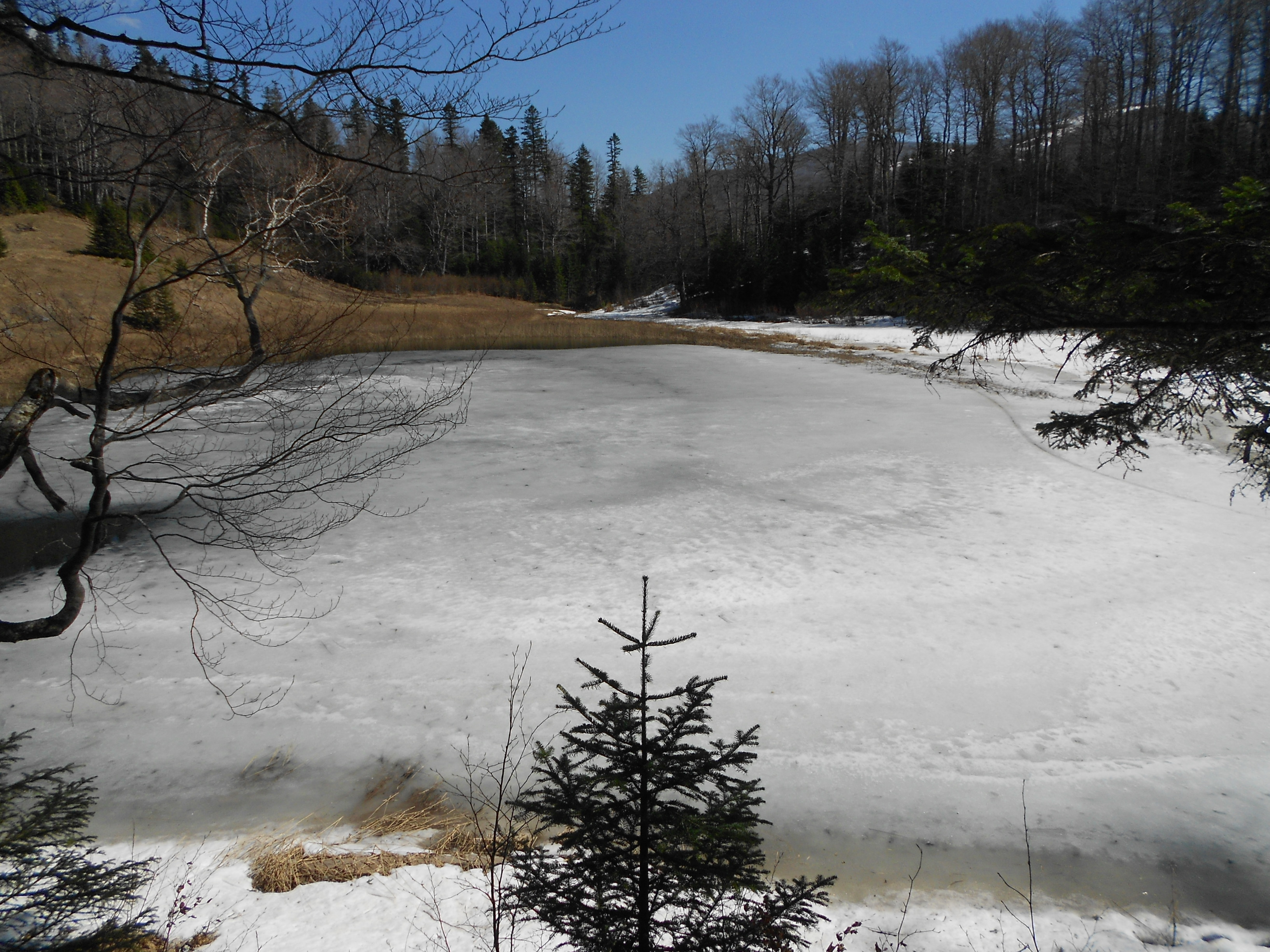 Template:Tos